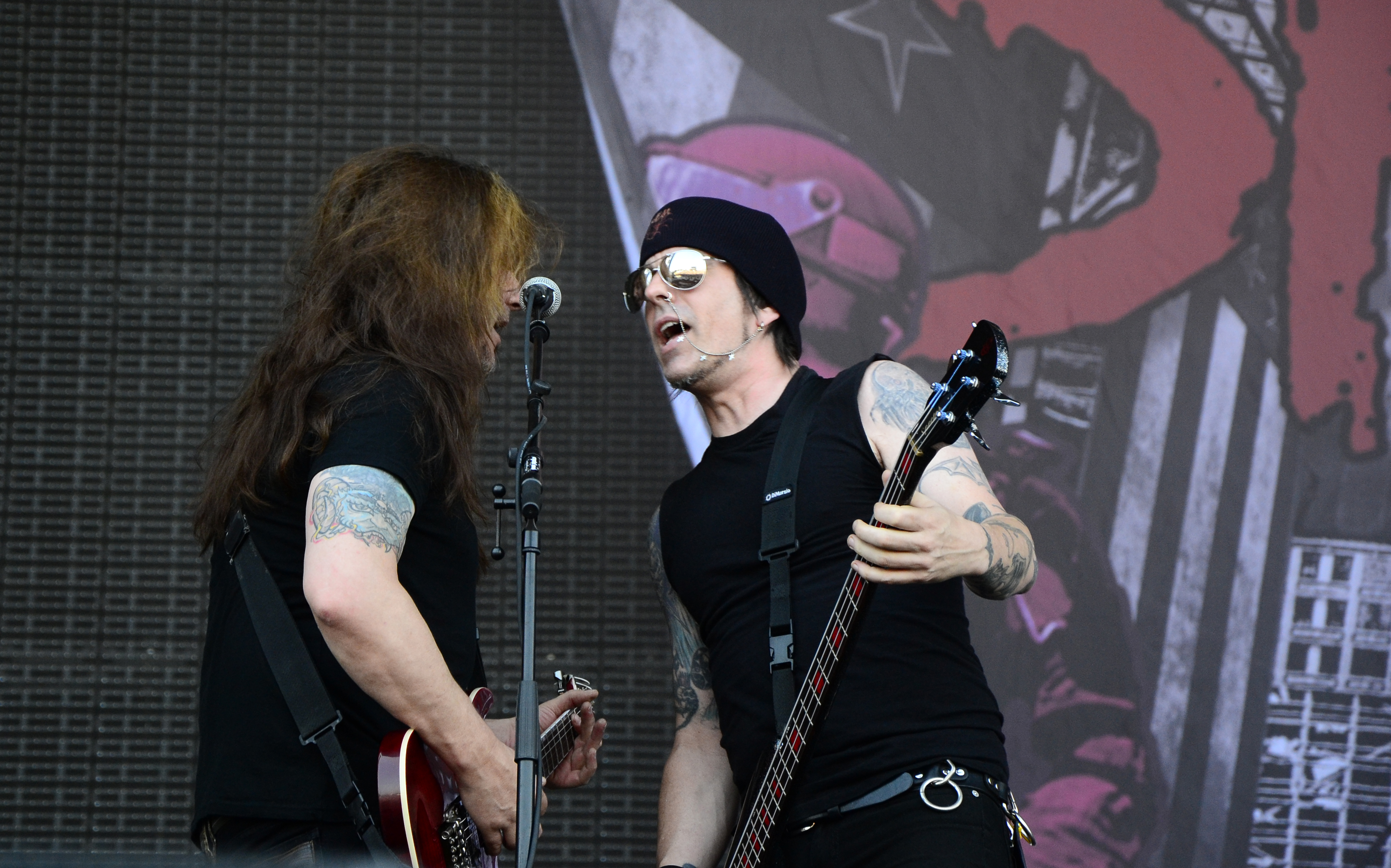 Skid Row beim Wacken Open Air 2014